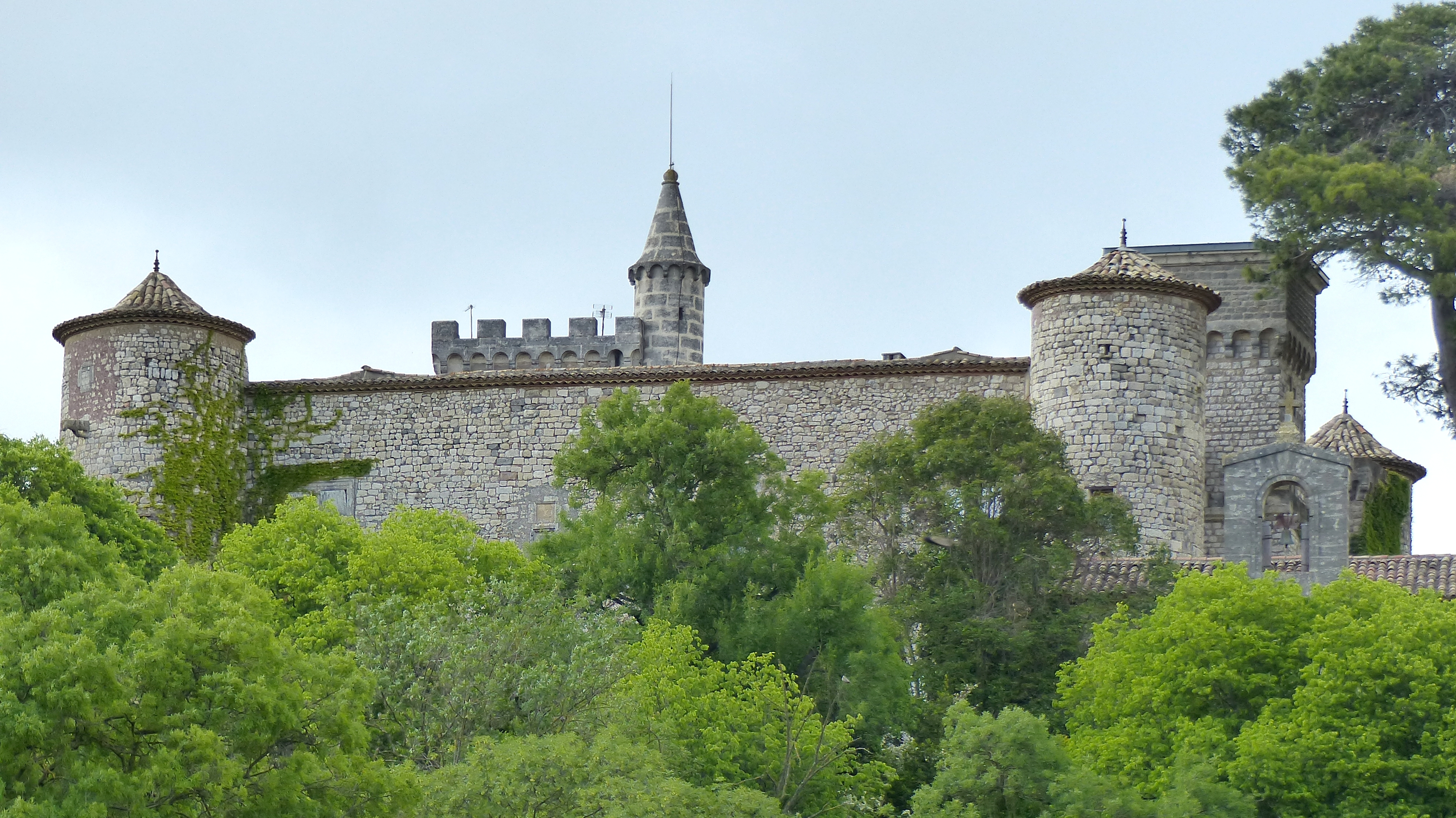 Montarnaud (Hérault, France), près de Montpellier, surplombant le vieux village, le château médiéval (12e siècle, modifié au 17e).